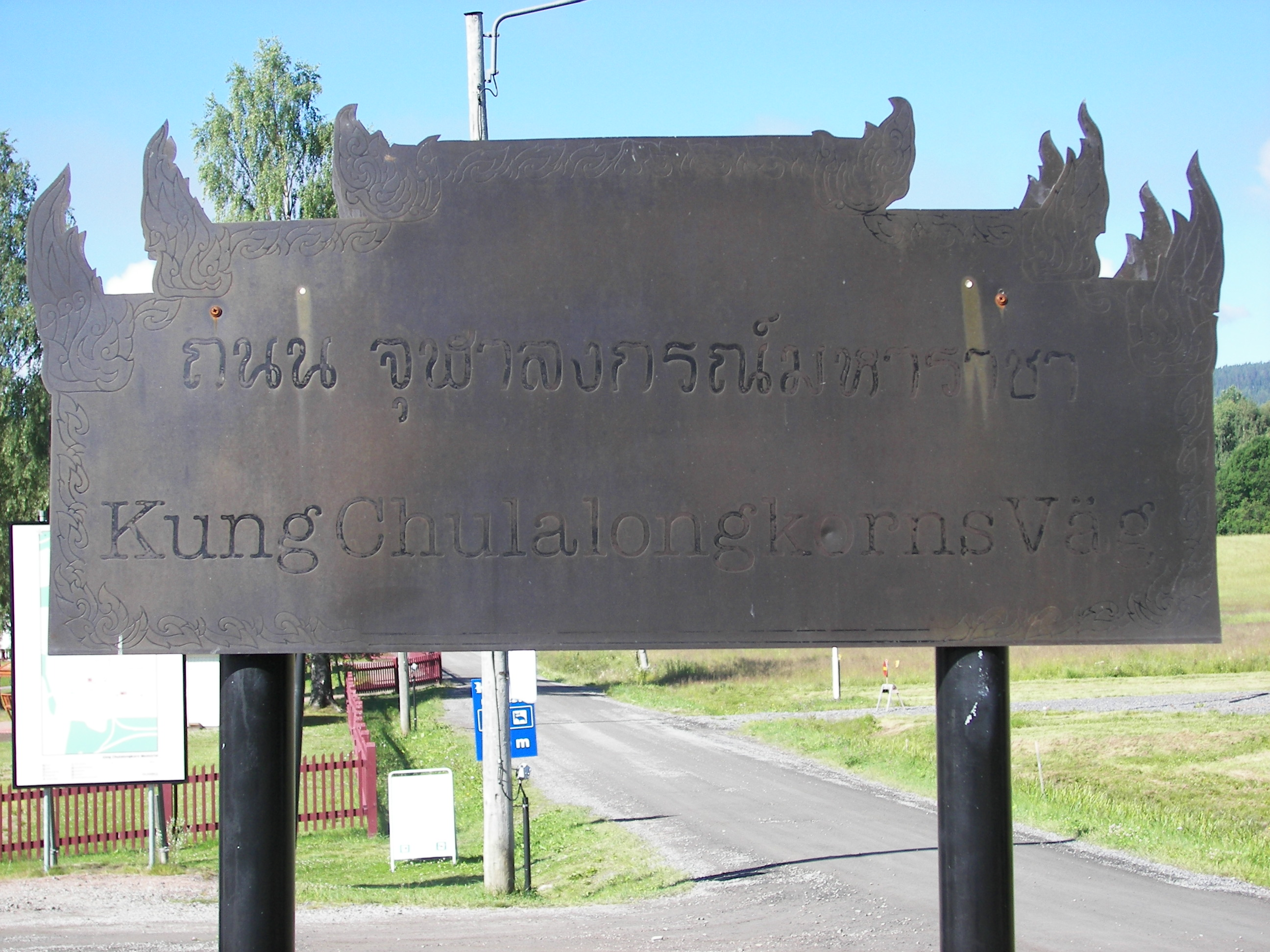 King Chulalongkorn Memorial